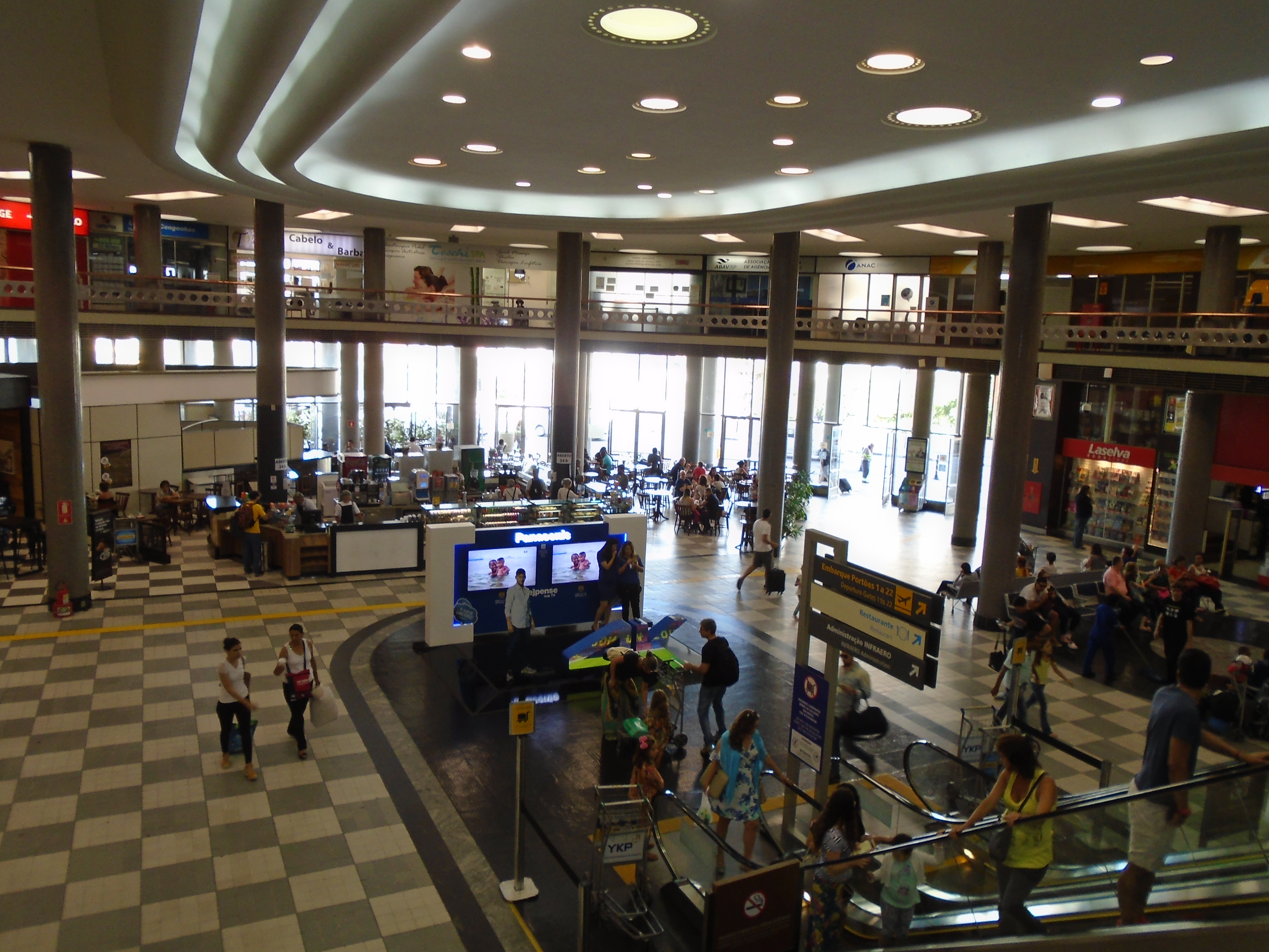 Aeroporto Internacional de Congonhas - 2016-01-31